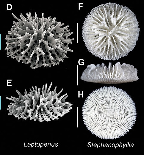 Recorte de ZooKeys-227-001-g019 jpeg de Commons